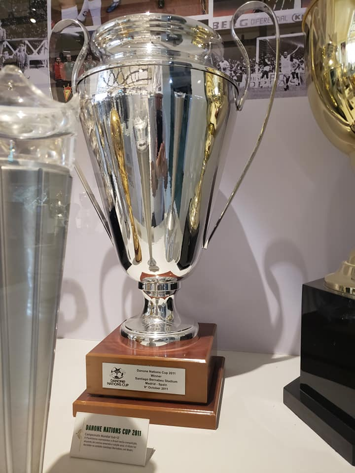 Taça da Danone Nations Cup Sub 13 de 2011 conquistada pelo Fluminense Football Club.